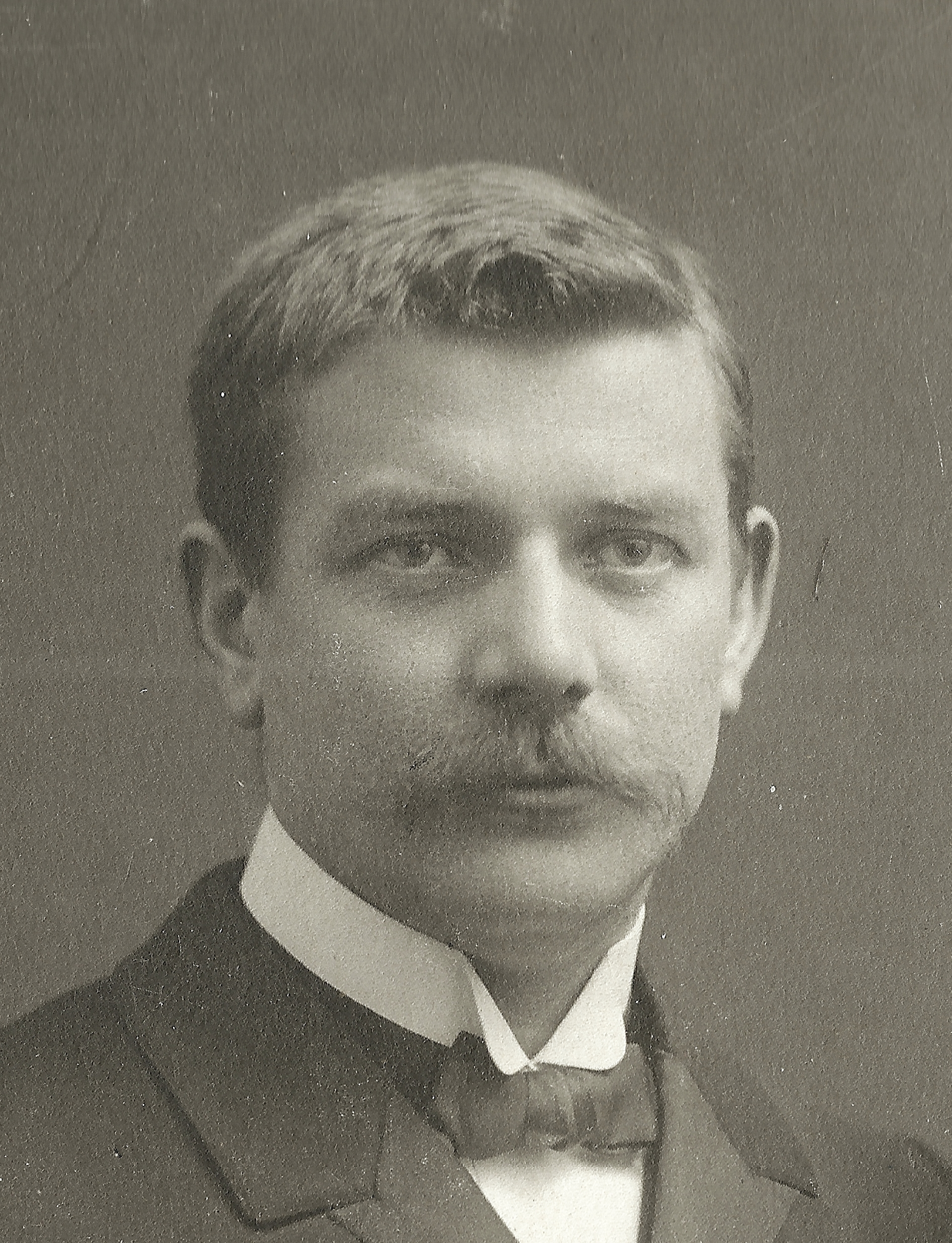 Handschriftlicher Kommentar von Hans Martin Sutermeister: „Onkel Hans Hunziker & Tante Brunhilde“.